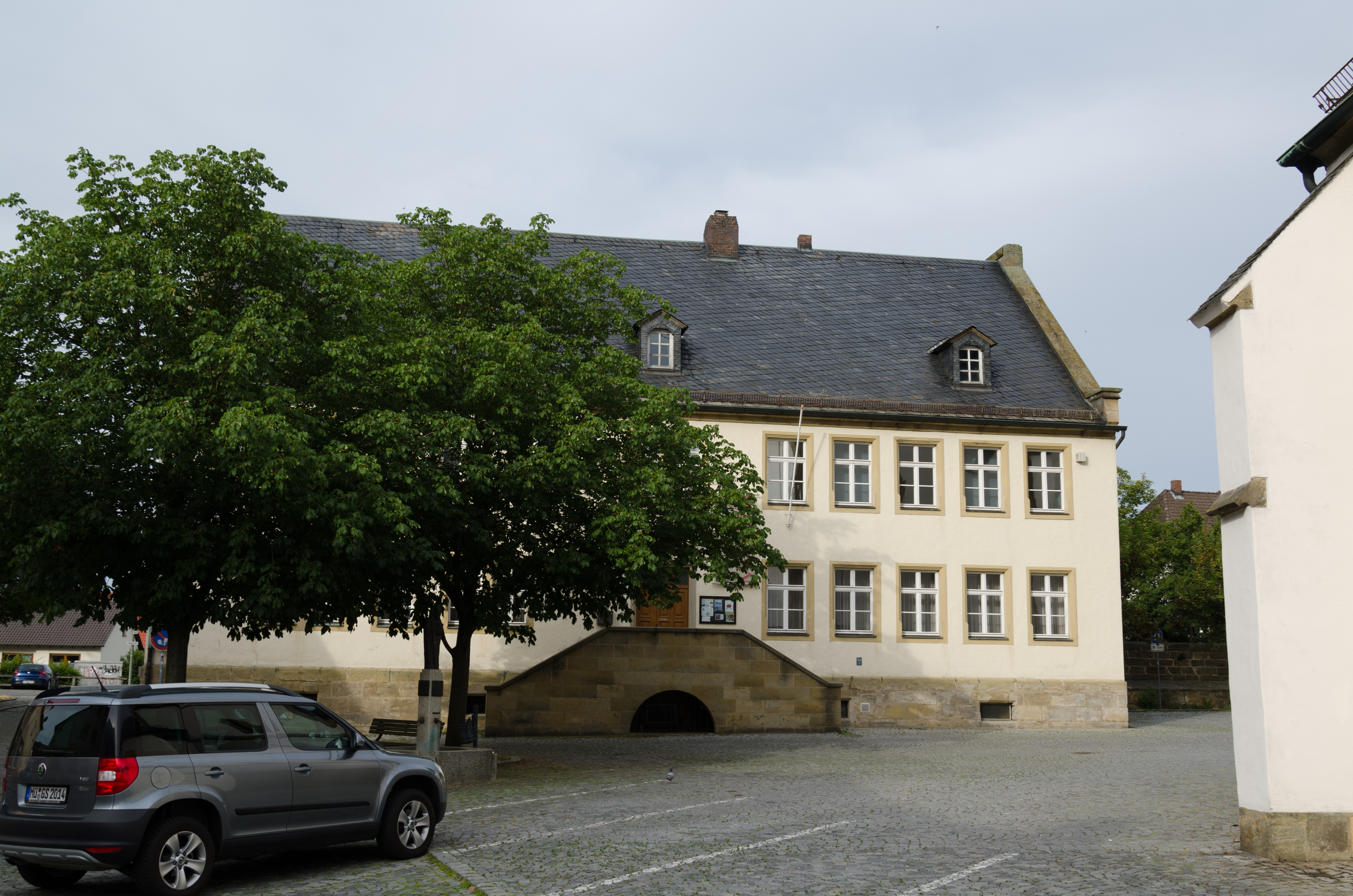 Bad Staffelstein, Kirchgasse 16